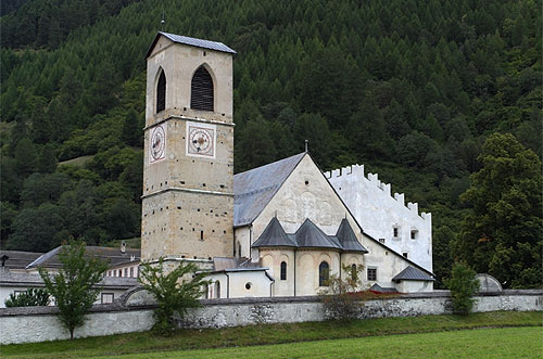 Clostra San Gion (San Gian / St. Johann) in Müstair